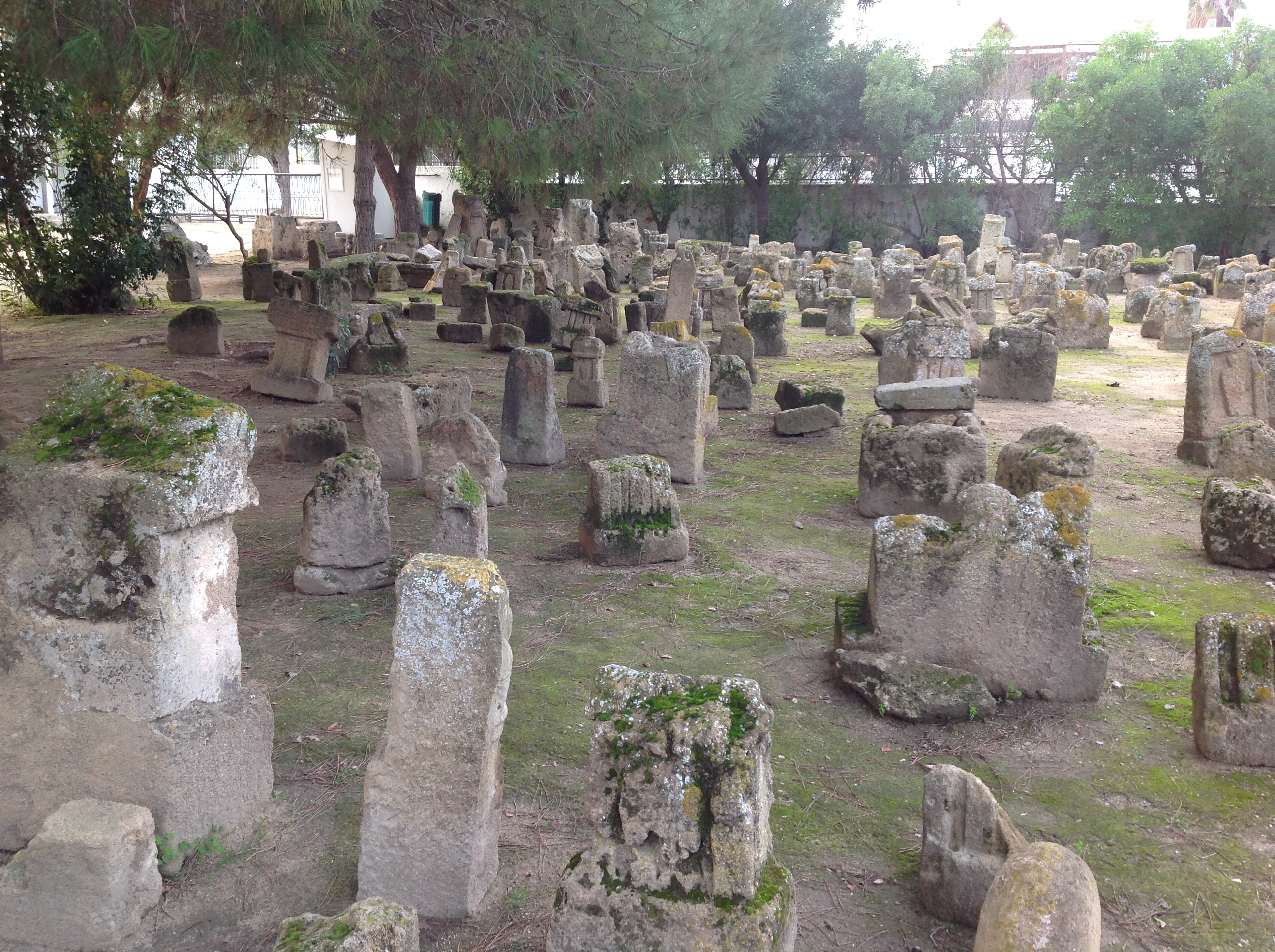 Nécropole punique dite le Tophet, Carthage